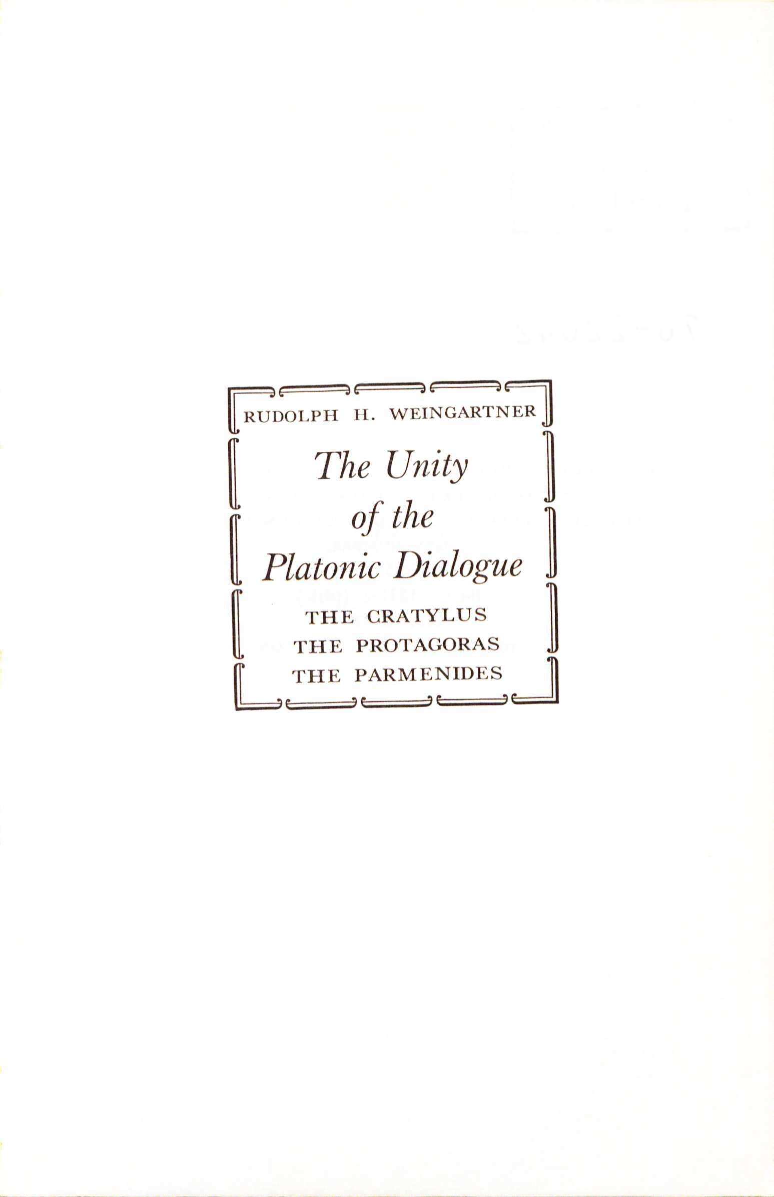 Rudolph H. Weingartner The Unity of the Platonic Dialogue: The Cratylus, the Protagoras, the Parmenides (1973)